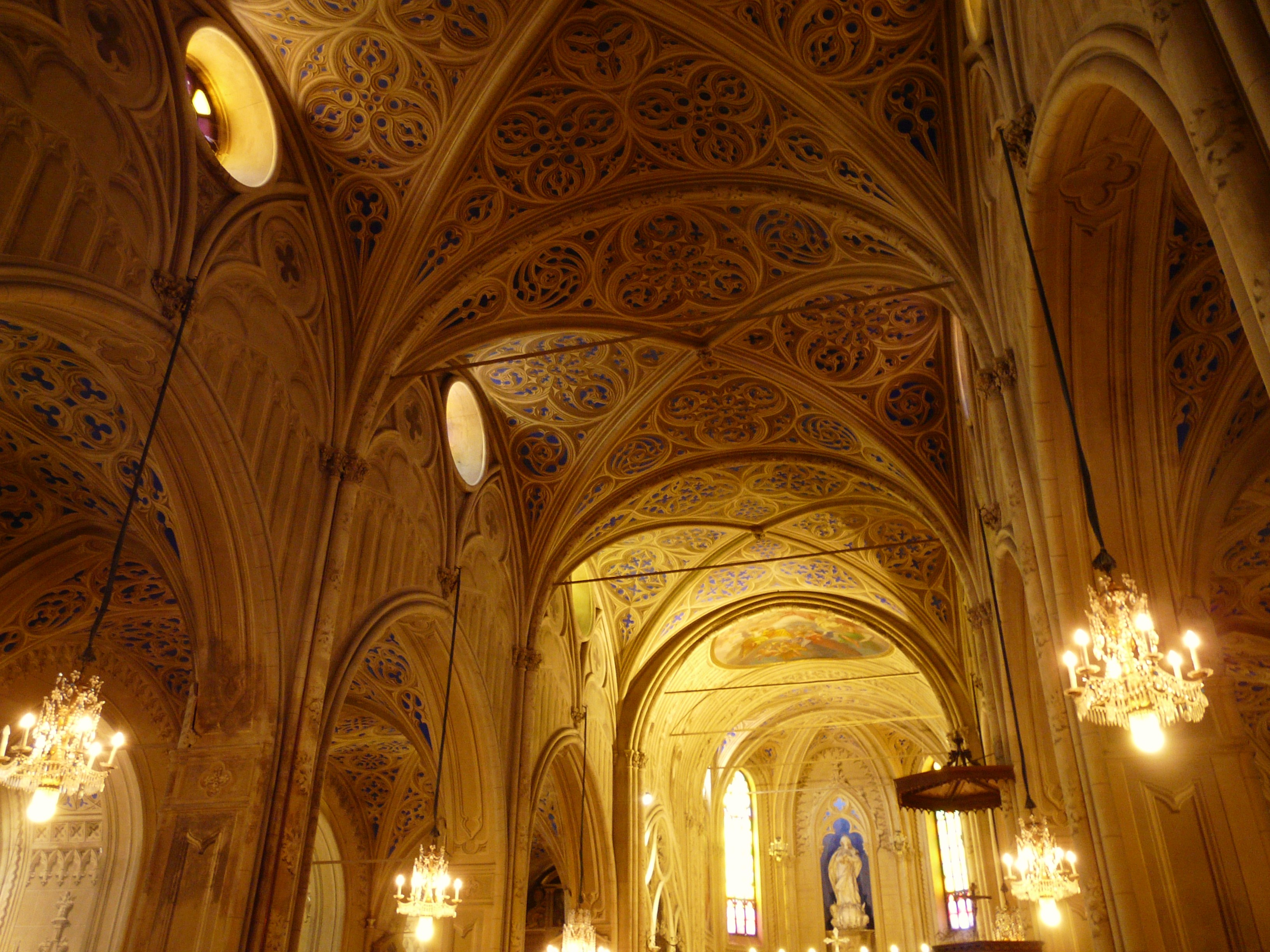 Chiesa di Santa Maria Assunta di Fubine, Piemonte, Italia